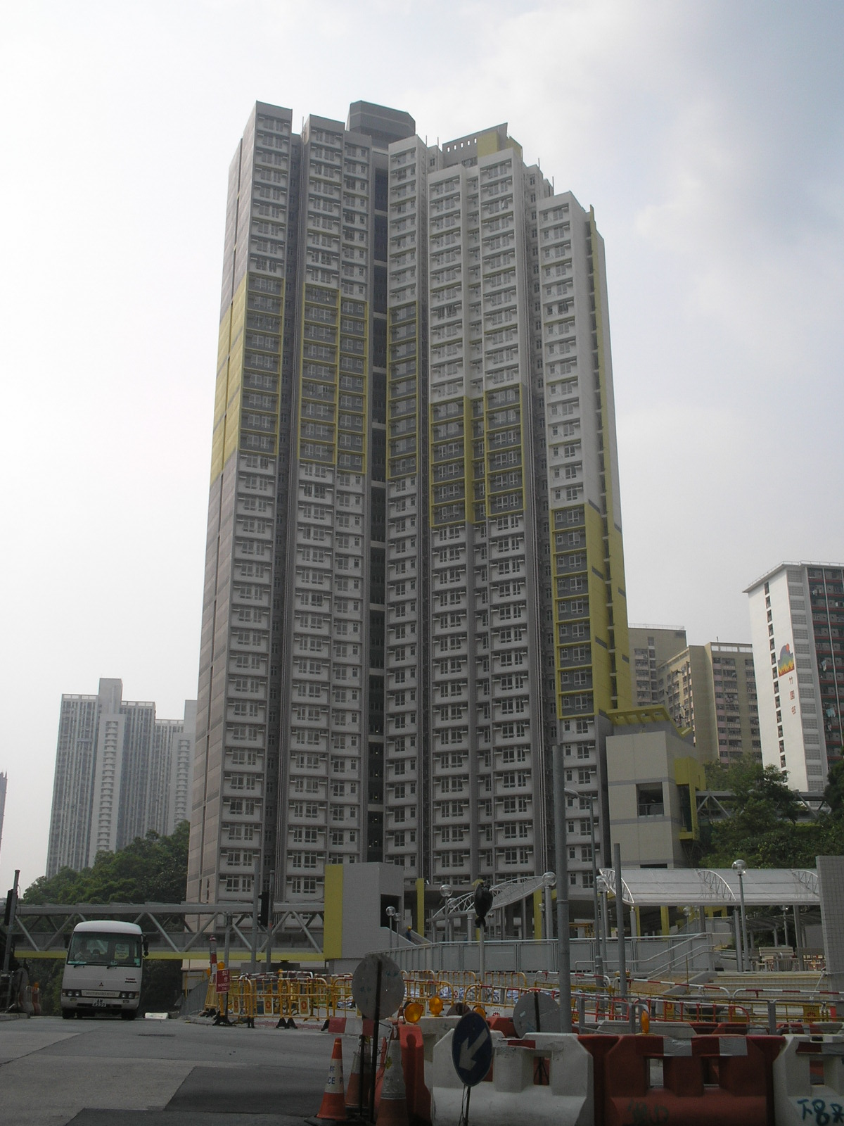 中文（香港）: 黃大仙上邨第三期詠善樓(2009年10月)